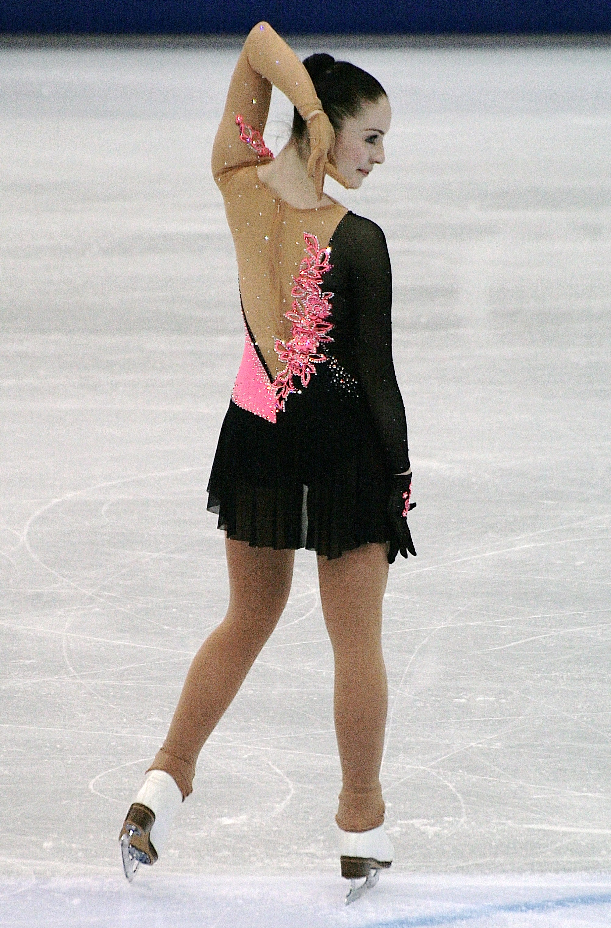 Флер Максвелл (Люксембург) на чемпионате мира по фигурному катанию 2012.